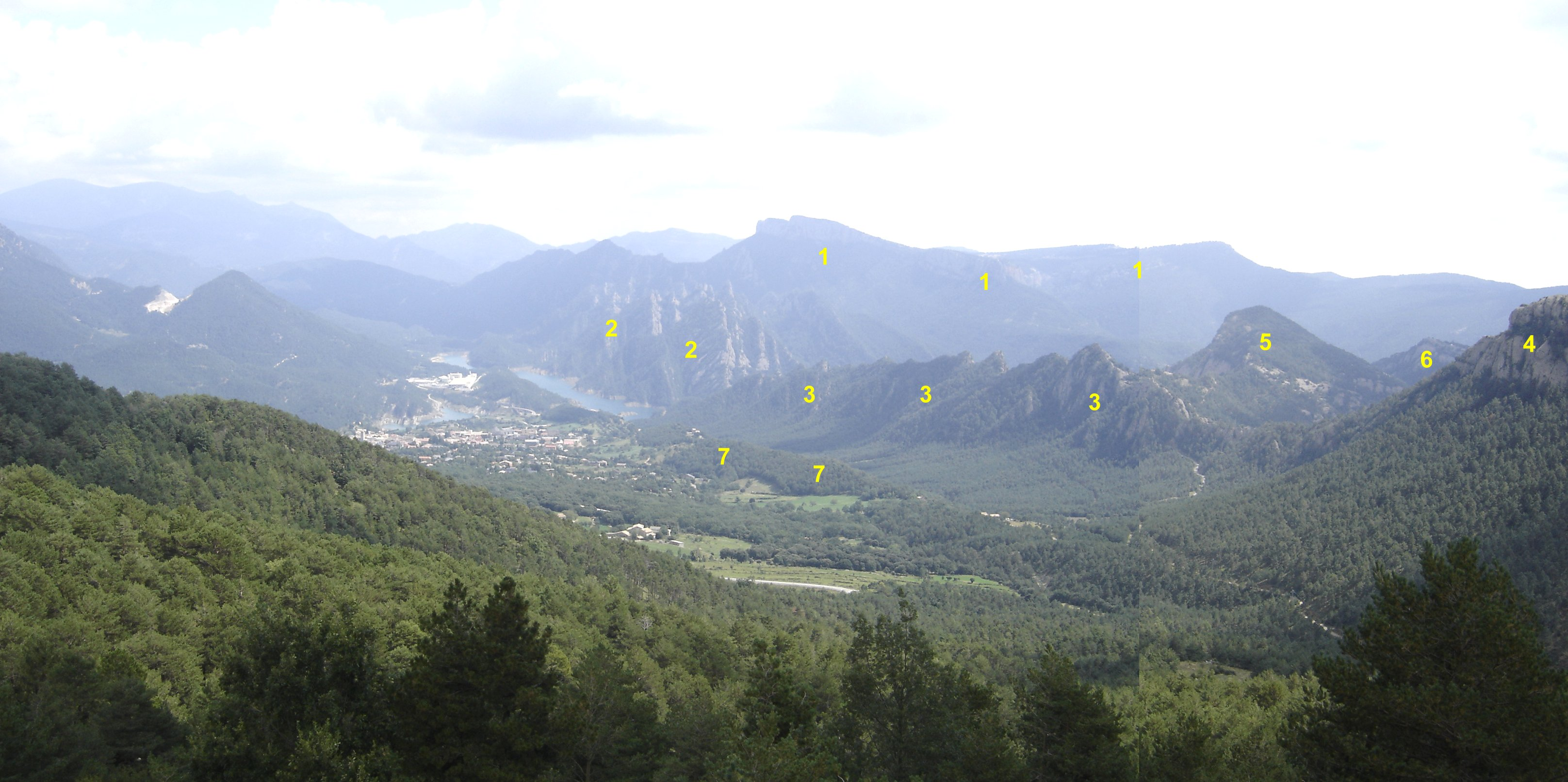 Bona part de la porció gran del municipi de Sant Llorenç de Morunys (Solsonès) vista des de vora Coll de Jou. LLEGENDA: 1- La serra de Busa 2-Els Llengots 3-Les Roques de Lord 4-La Creu del Codó 5- El Tossal de Vall-llonga 6- La Mola de Lord 7- El Serrat de la Creueta